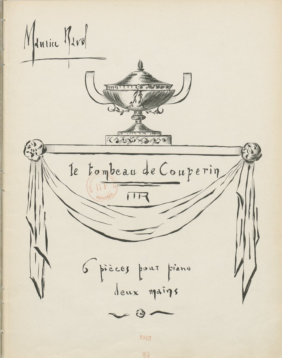 Couverture de la première édition chez Durand Cie (1918), dessinée par Ravel lui-même.